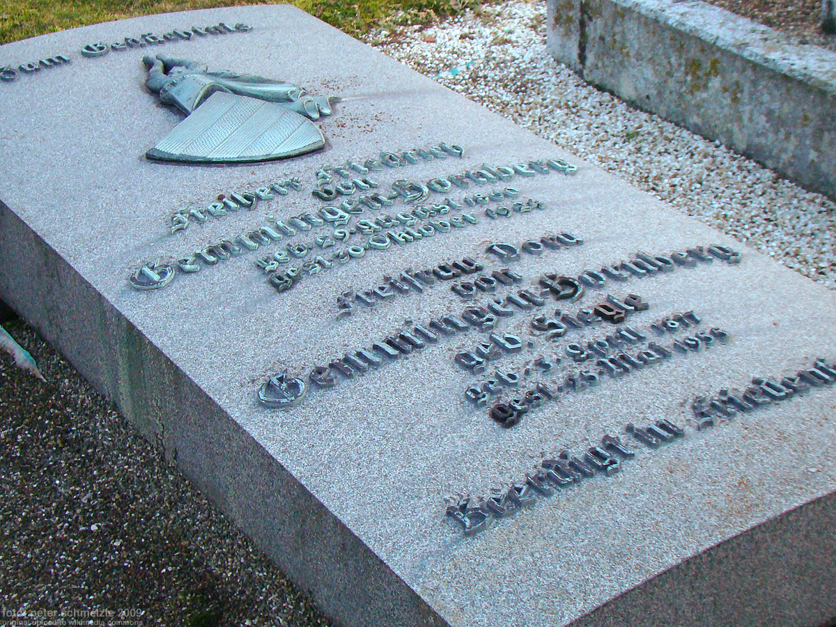 Grabmal für Freiherr Friedrich von Gemmingen-Hornberg und seine Gattin Dora geb. Siegle in der Familiengrablege der Freiherren von Gemmingen in Bad Rappenau-Babstadt